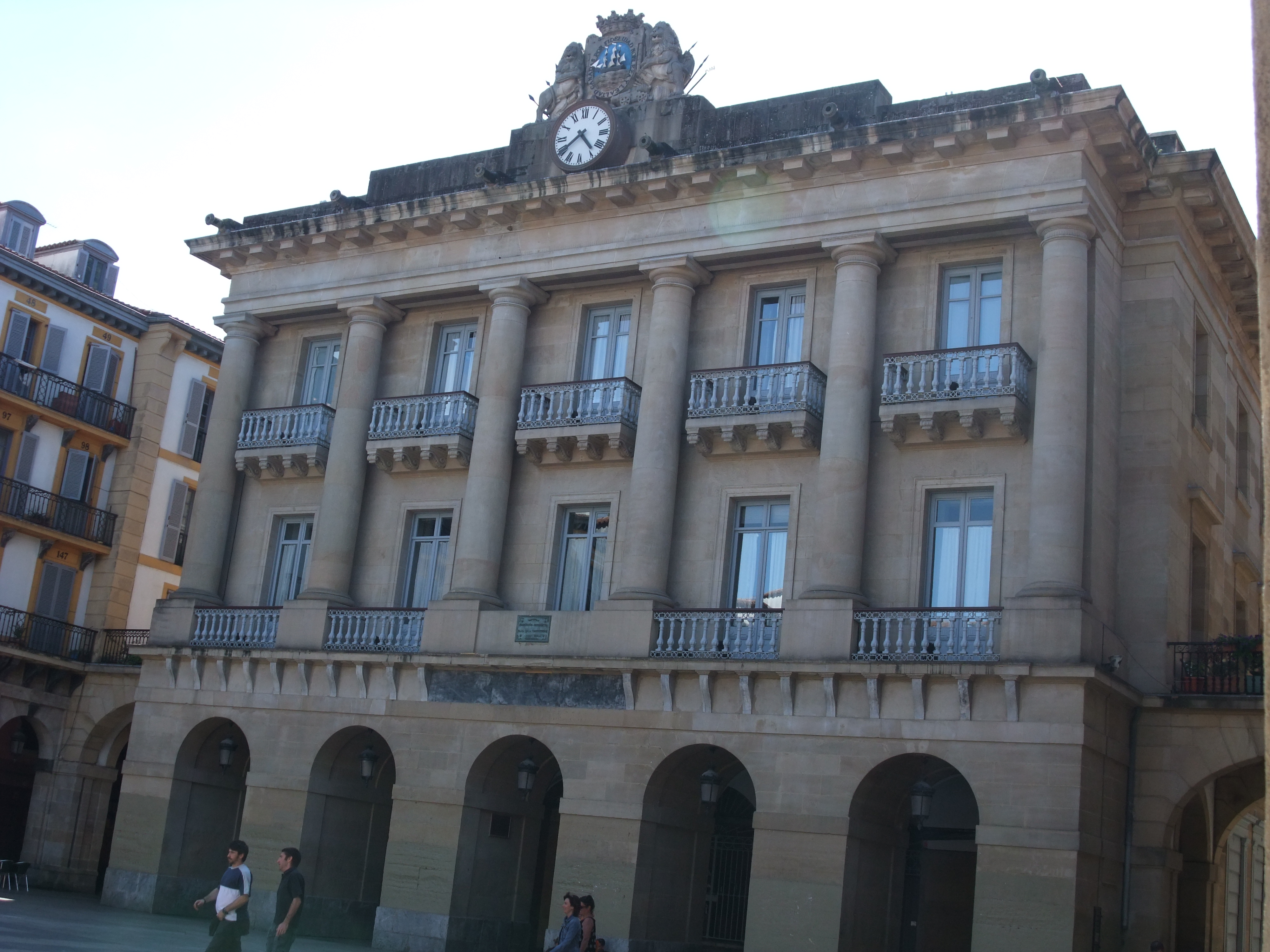 San Sebastián (Guipúzcoa)-Plaza de la Constitución-Antiguo Ayuntamiento